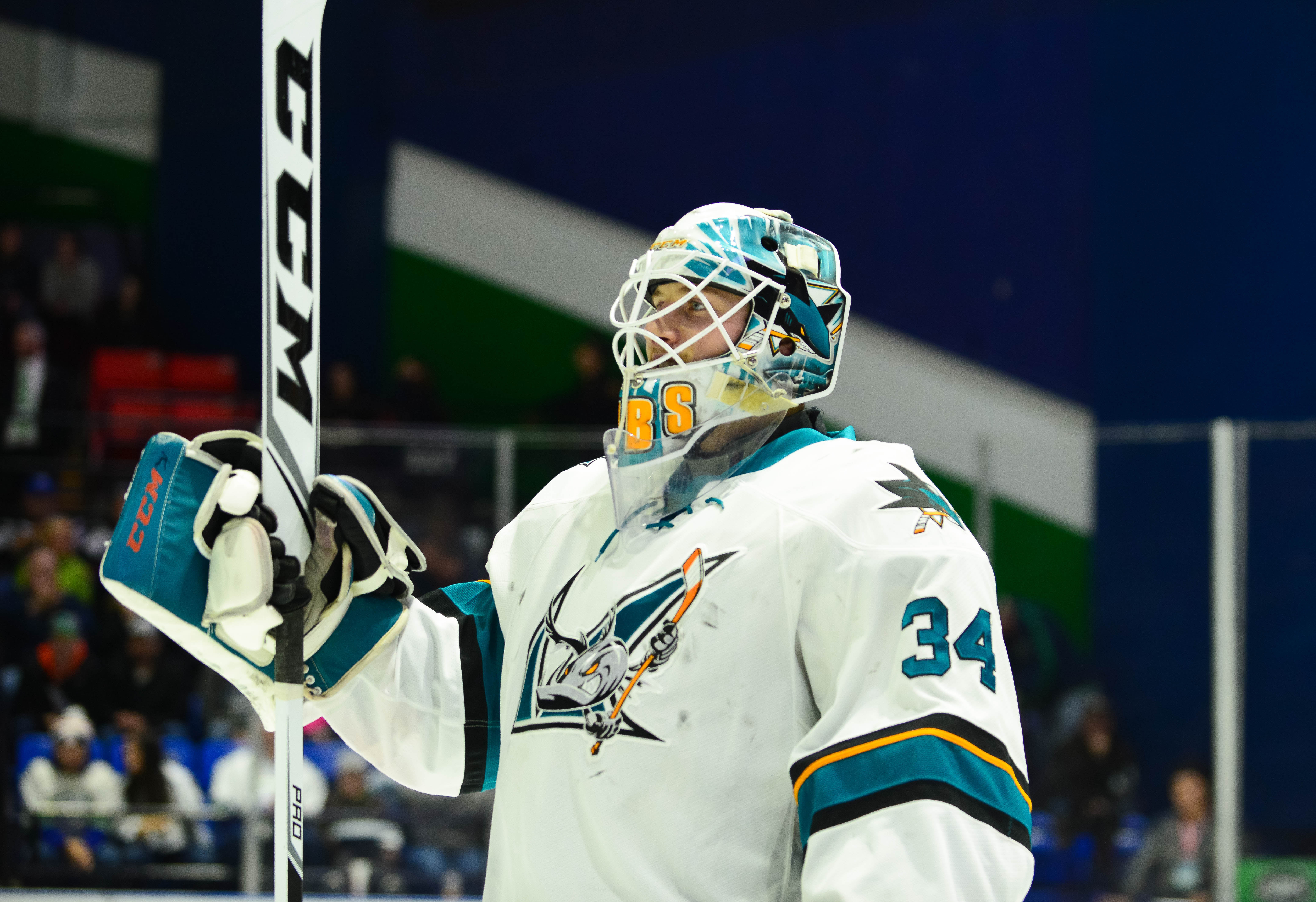 (Bryan Peck/ AHL)